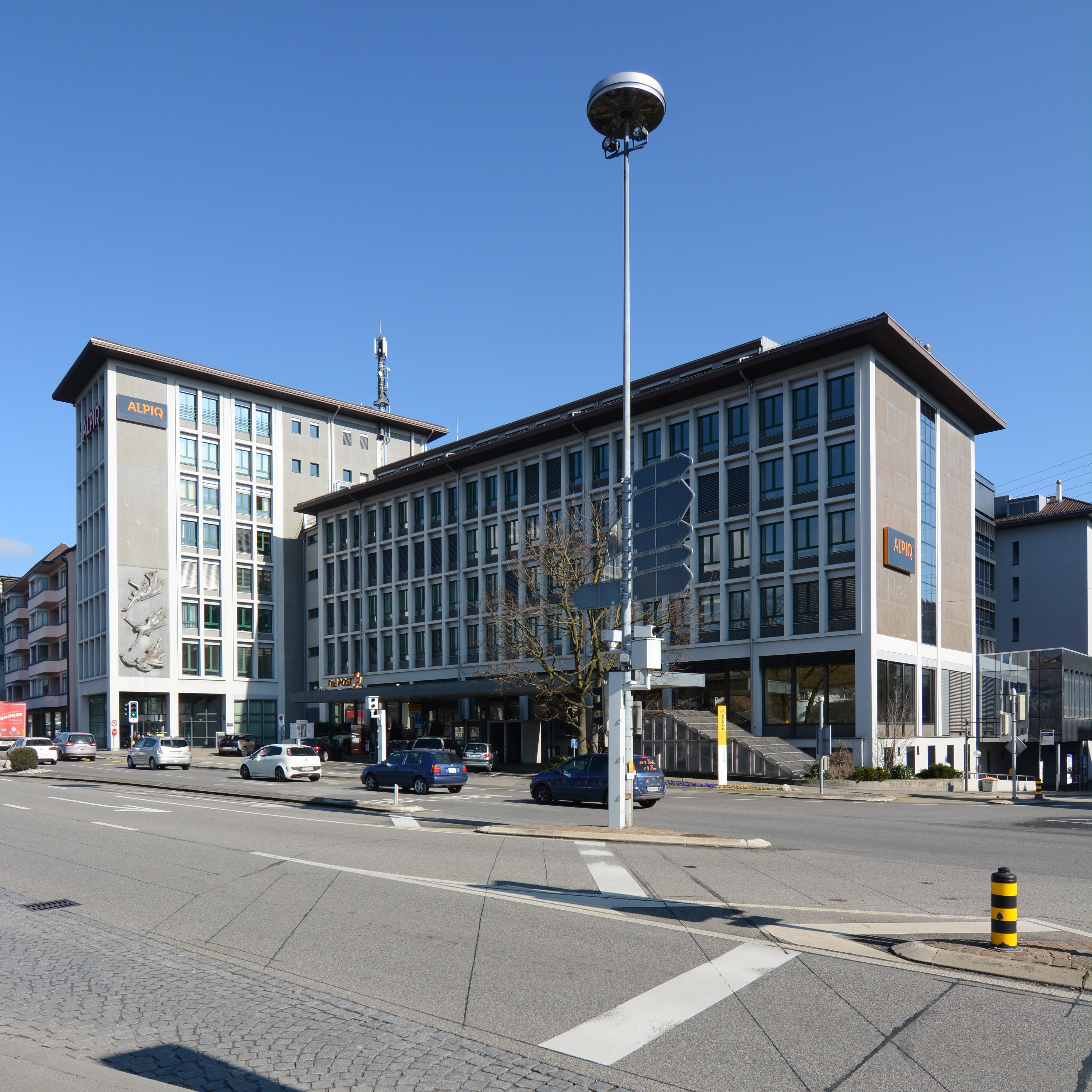 Verwaltungsgebäude Aare-Tessin AG und Hauptpost, (ATEL), Olten, 1946–1953, 1978. Architekten: Barth und Zaugg